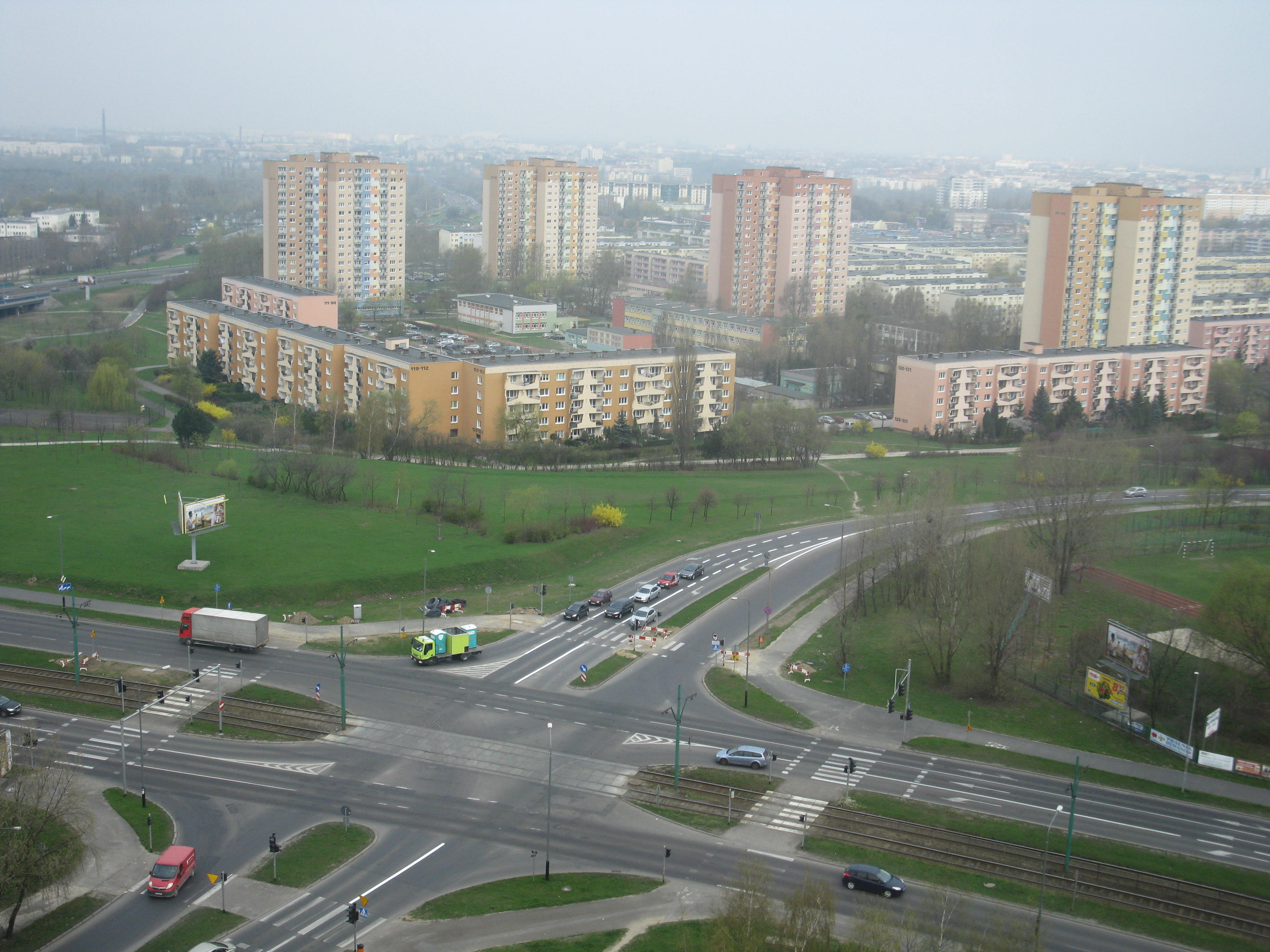 Osiedle Armii Krajowej w Poznaniu